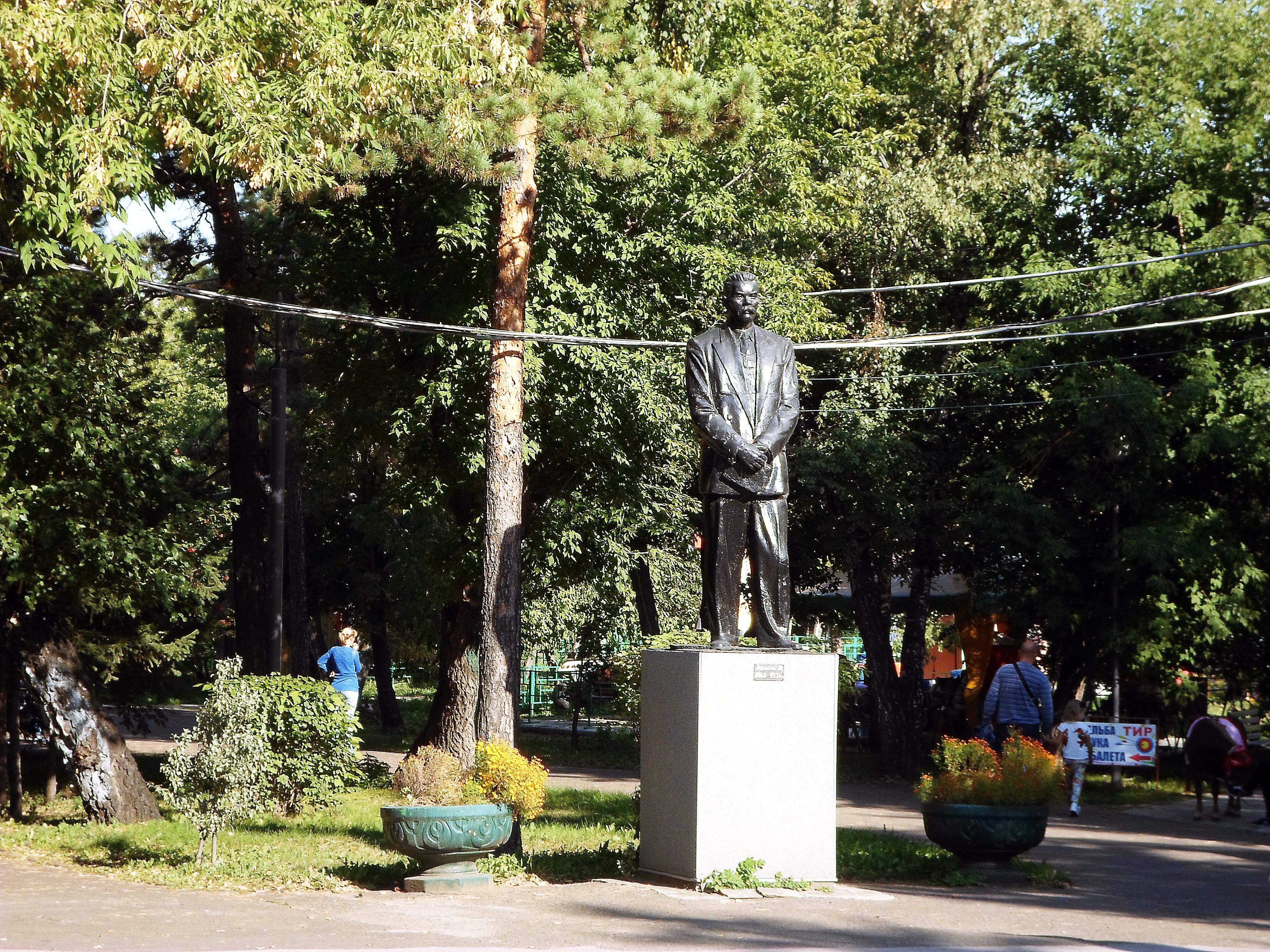 Памятник А. М. Горькому в Центральном парке Красноярска.